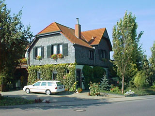 Der Nörvenicher Bahnhof als Wohnhaus im Jahre 2004